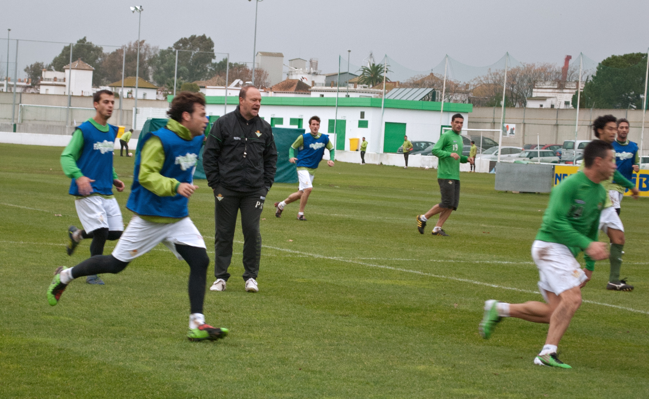 Pepe Mel dirigiendo un entrenamiento del Betis en diciembre de 2010